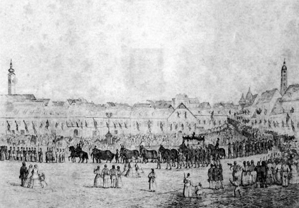 Litografija Sprovod bana Josipa jelačića, posmrtna povorka prolazi preko Trga bana Jelačića u Zagrebu 26. svibnja 1859., snimljeno u Muzeju grada Zagreba